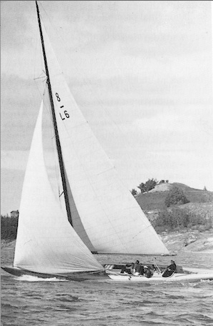 8mr Vågspel från HSS årsbok 1944